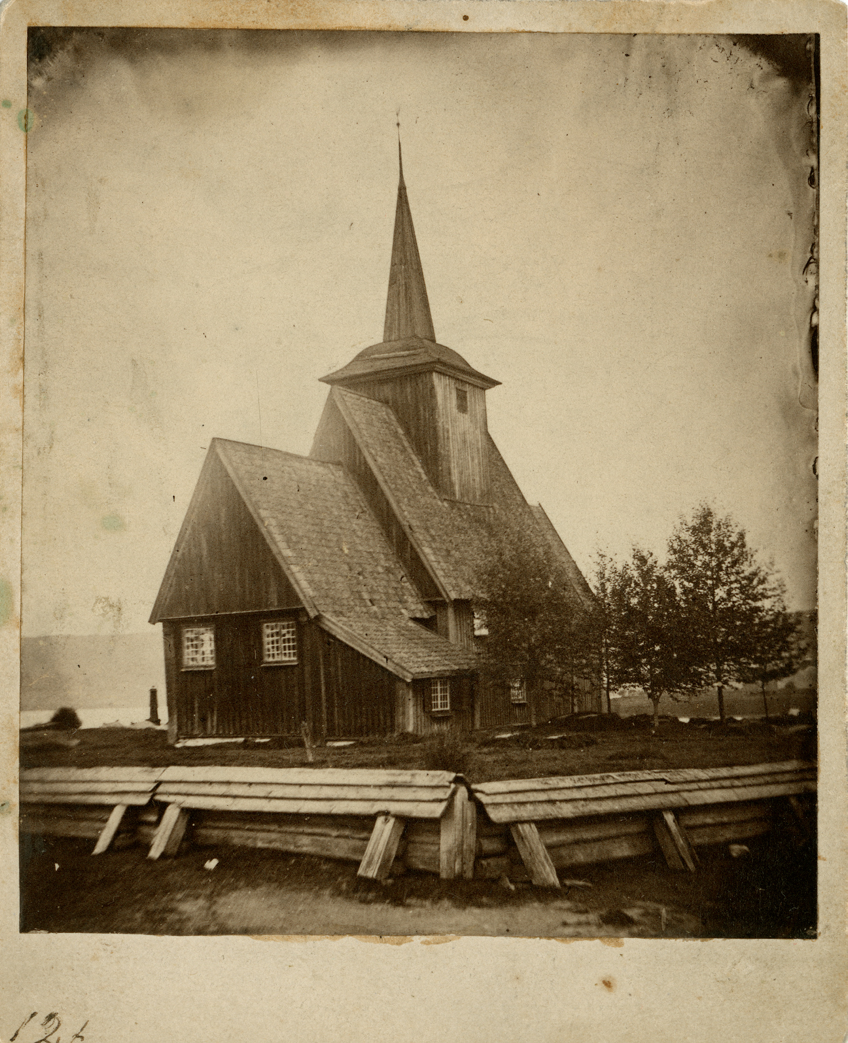 Hemnes gamle kirke, Høland, oppført ca. 1620 og på bygget senere. Revet ca. 1866.